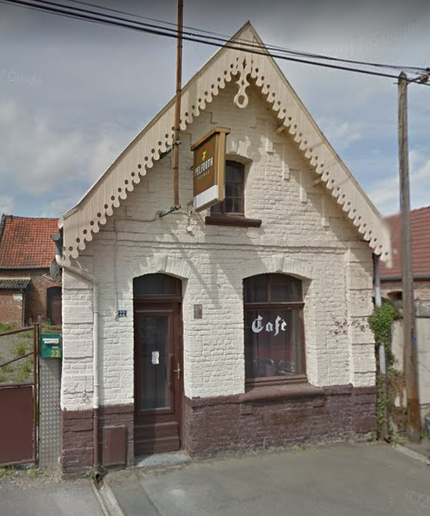 Photographie du café exploité par la mère de Cathy Petit, victime de Carrein